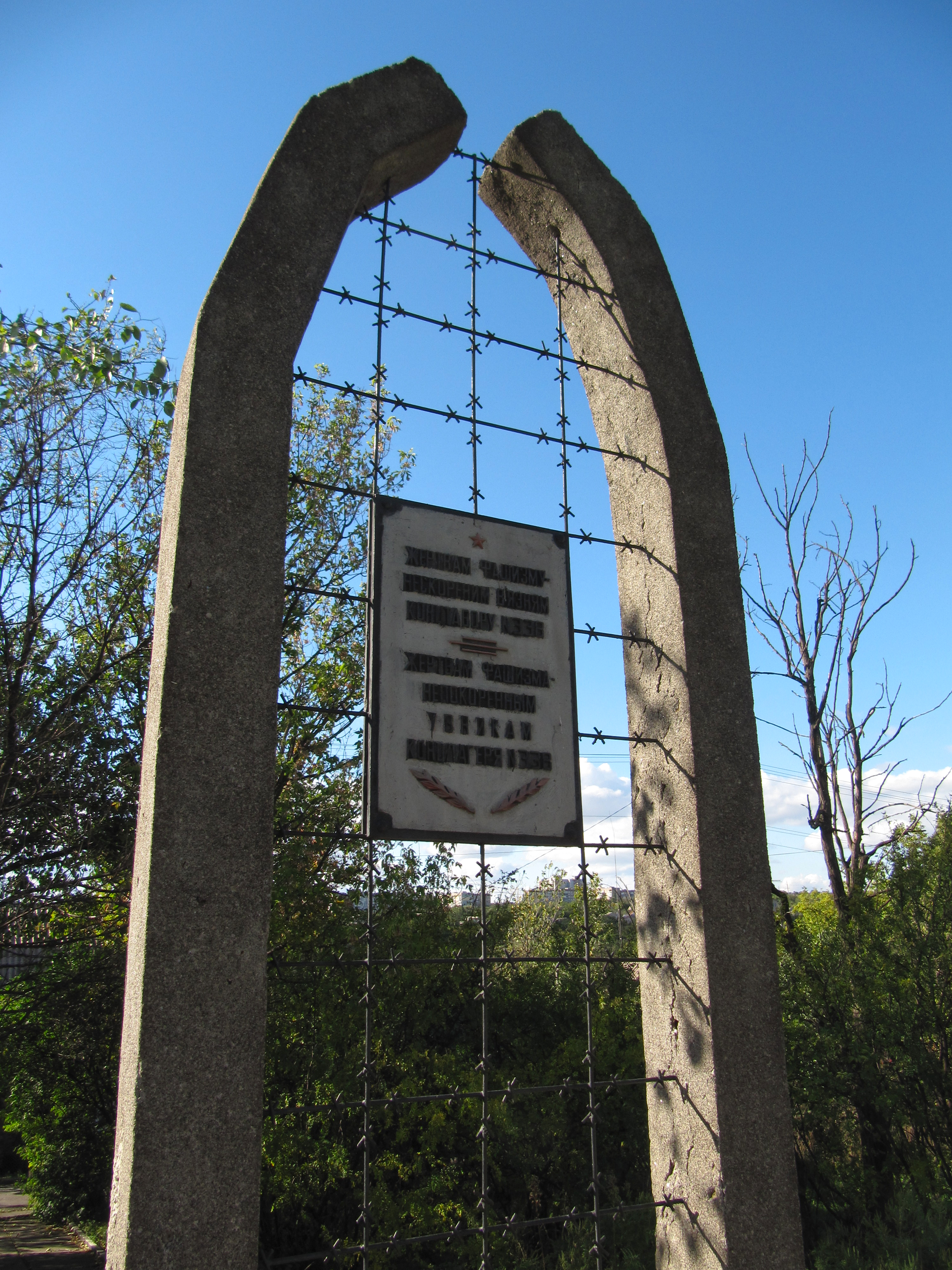 Пам’ятний знак «В’язням концтабору» у Антонівці